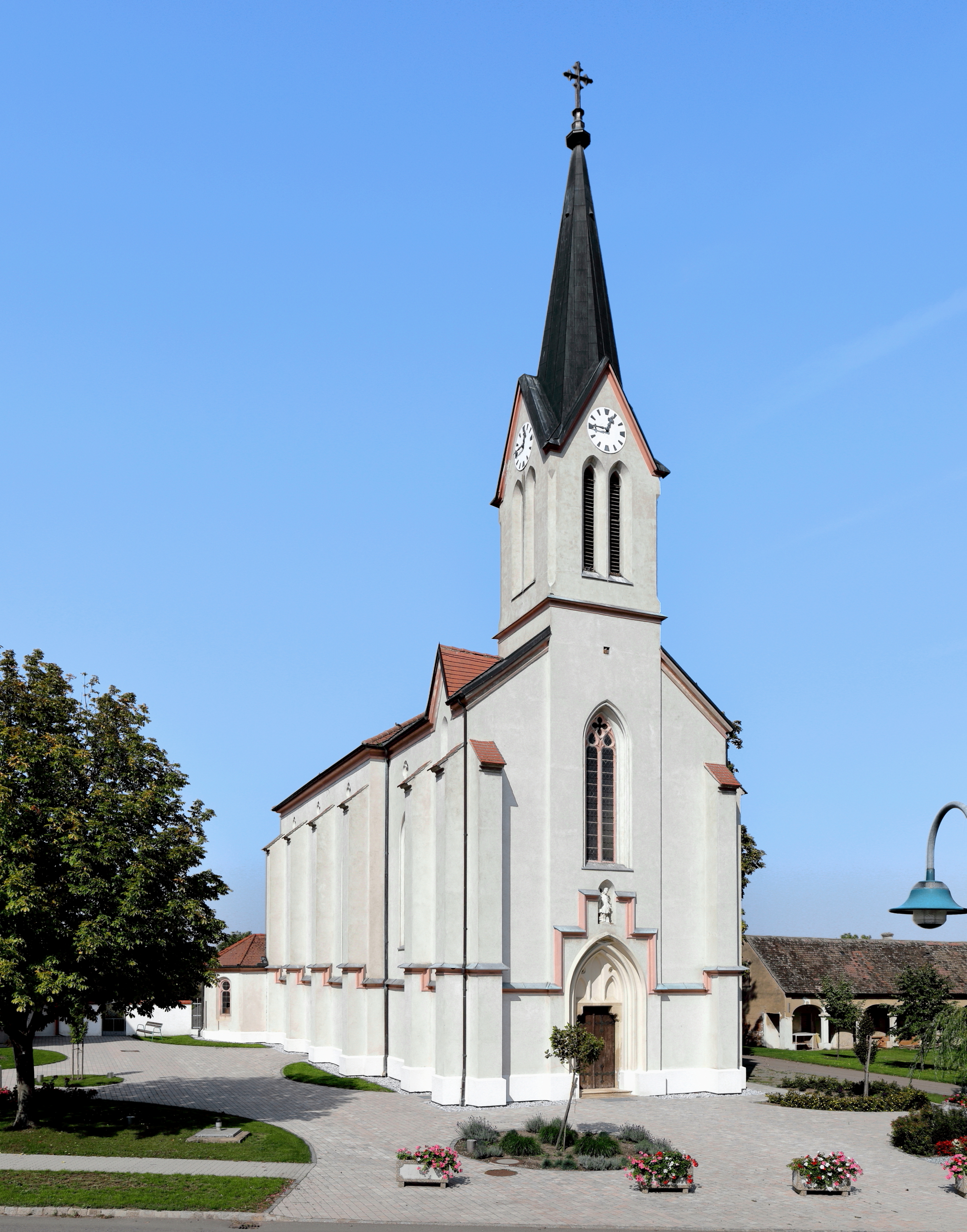 Südansicht der röm.-kath. Pfarrkirche hl. Florian in Pottenhofen, ein Ortsteil der niederösterreichischen Gemeinde Wildendürnbach. Die neogotische Kirche mit einem Fassadenturm wurde ab 1859/60 errichtet und 1861 geweiht.